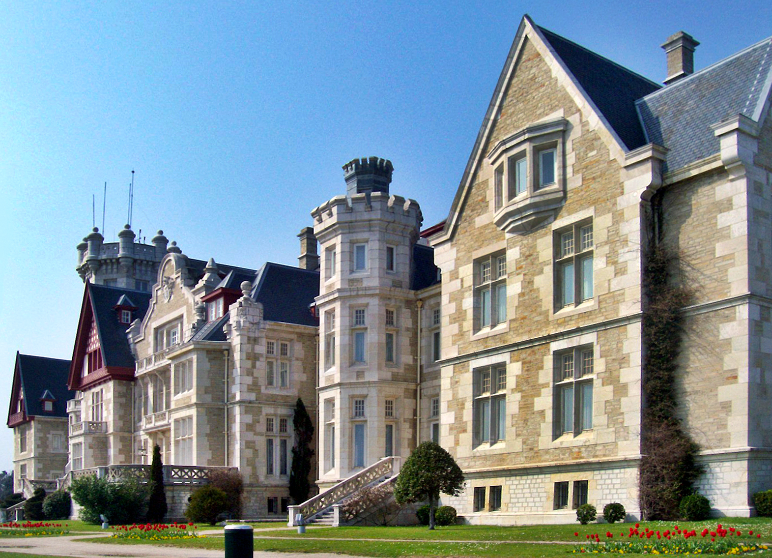 Palacio de la Magdalena, Santander